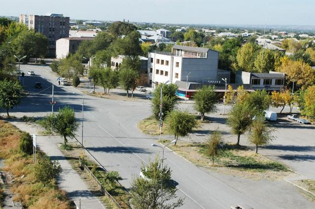 c'est photo à été pris en aout 2008, dans la ville d'Artashat